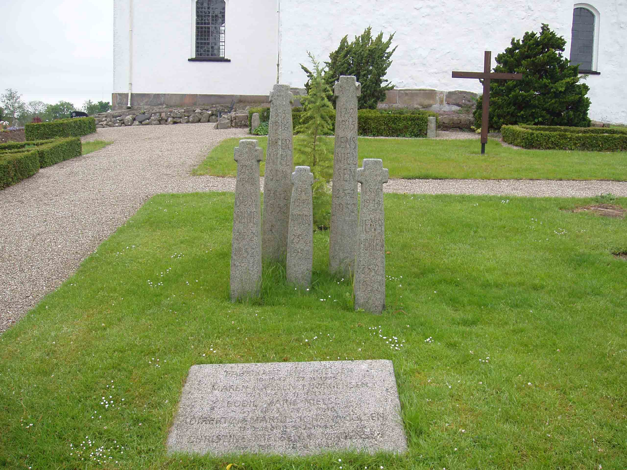 Gravsted på Vester Åby kirkegård med 5 søjler af forskellig højde for administrerende direktør Jens Nielsen, hans hustru Inger og børnene Susanne, Jens Morten og Anders, der alle omkom ved en drukneulykke i Svendborg Havn 25. februar 1952.